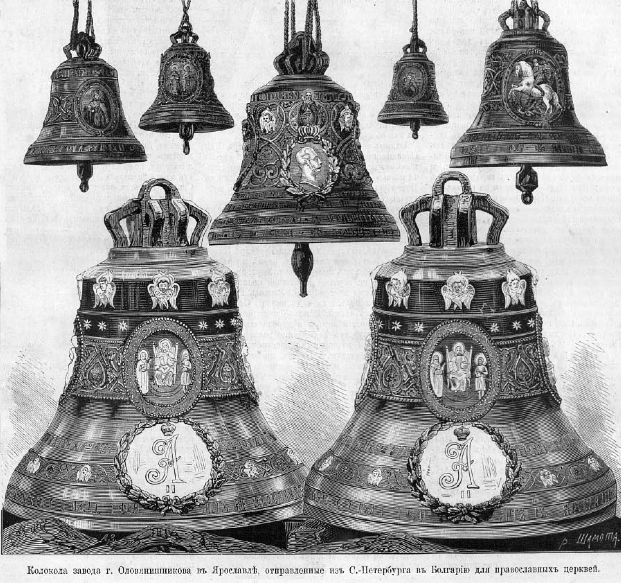 Колокола завода Оловянишникова в Ярославле, 1877 год